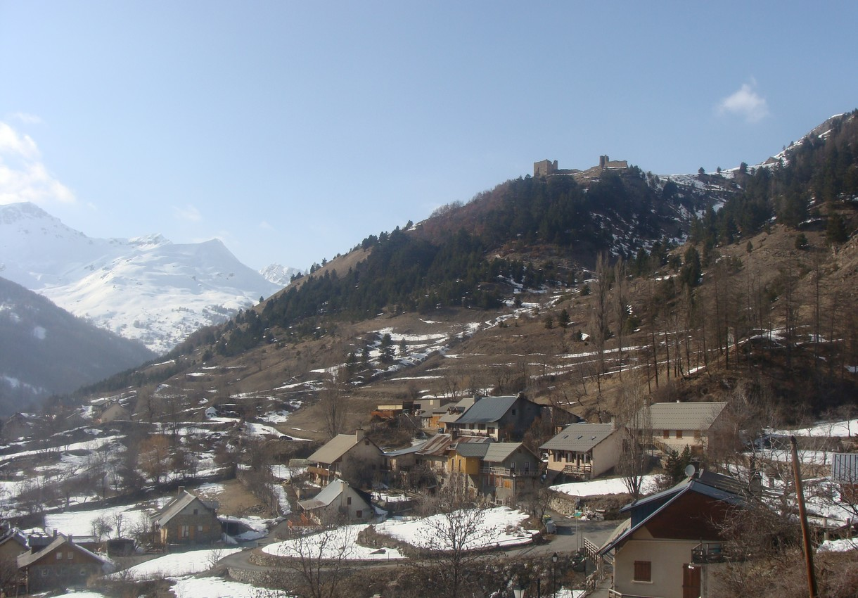 Le fort ou château de Réallon (Hautes-Alpes) vu du village au printemps.